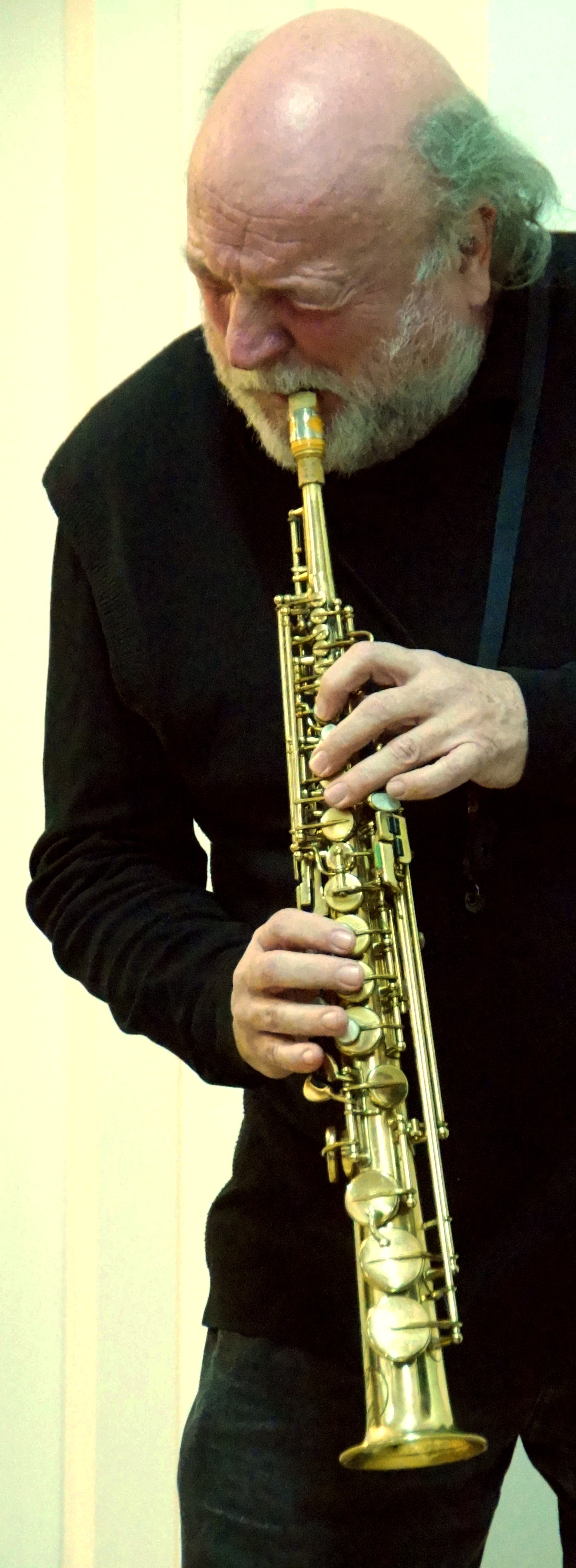 Vienna 2013-12-10 CZ center Vernissage Ondrej Kohout 013 Fritz Novotny